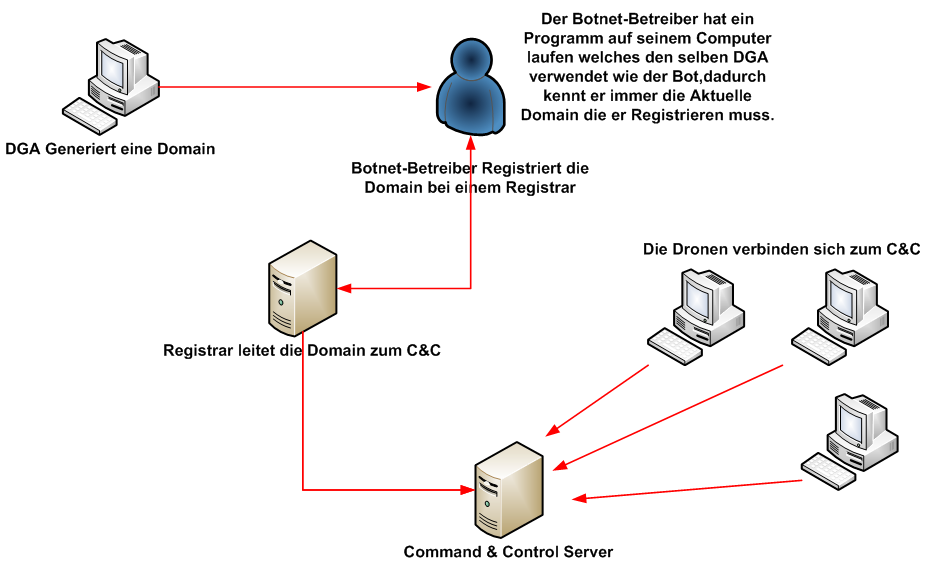 Ablauf einer Domain Registirerung